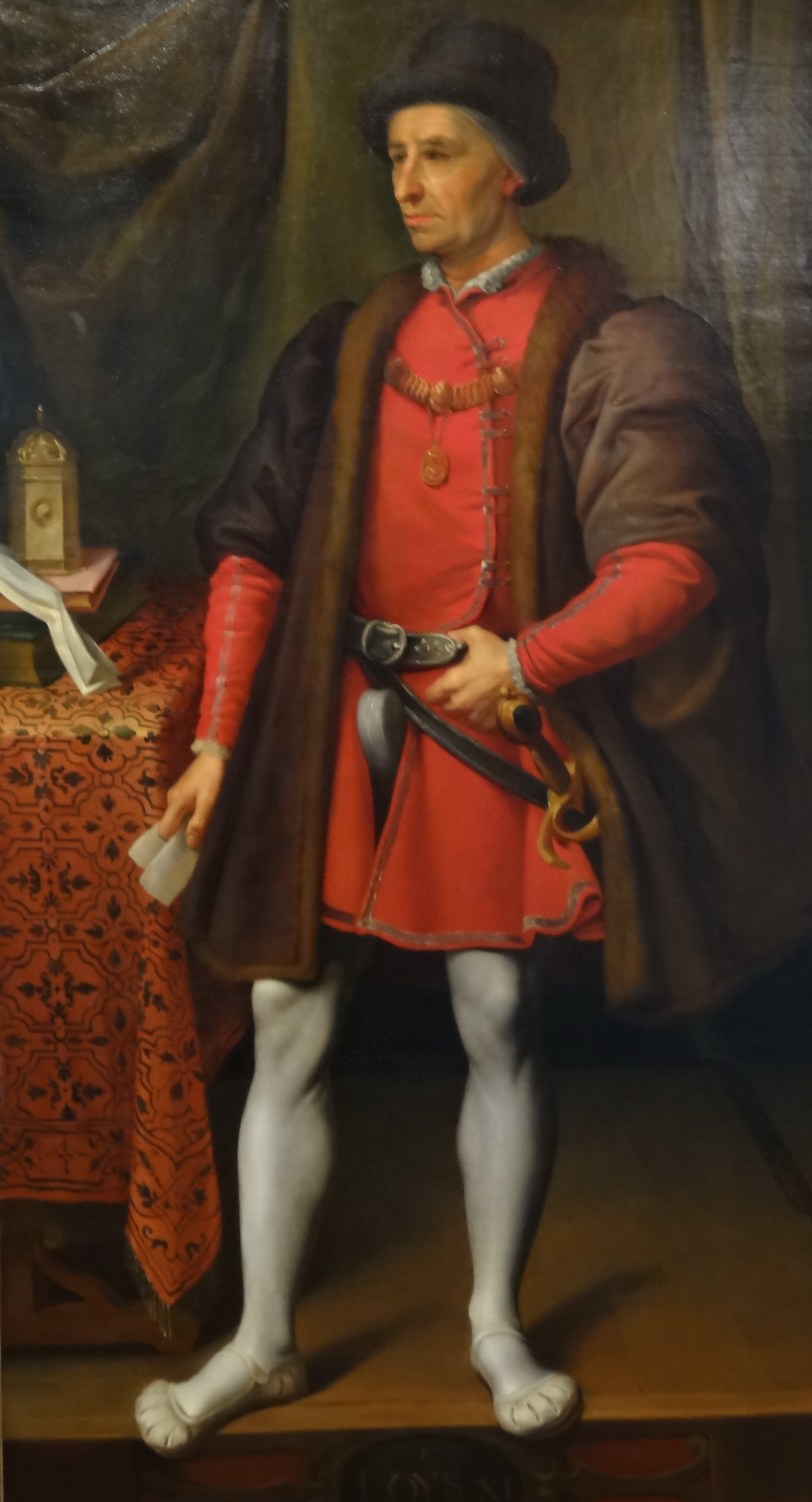 Портрет выполнен с оригинала, хранившегося прежде во дворце Пале-Рояль, по заказу короля Луи-Филиппа для Исторического музея Версаля в 1836 году.